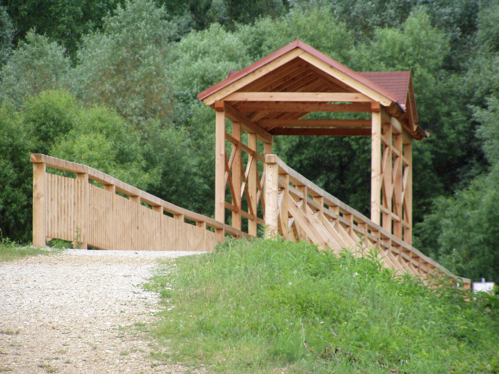 Bridge of Andau. Here, in 1956, tens of thousands of Hungarians fled to Austria/Brücke von Andau, über die 1956 Zehntausende Ungarn nach Österreich flohen.